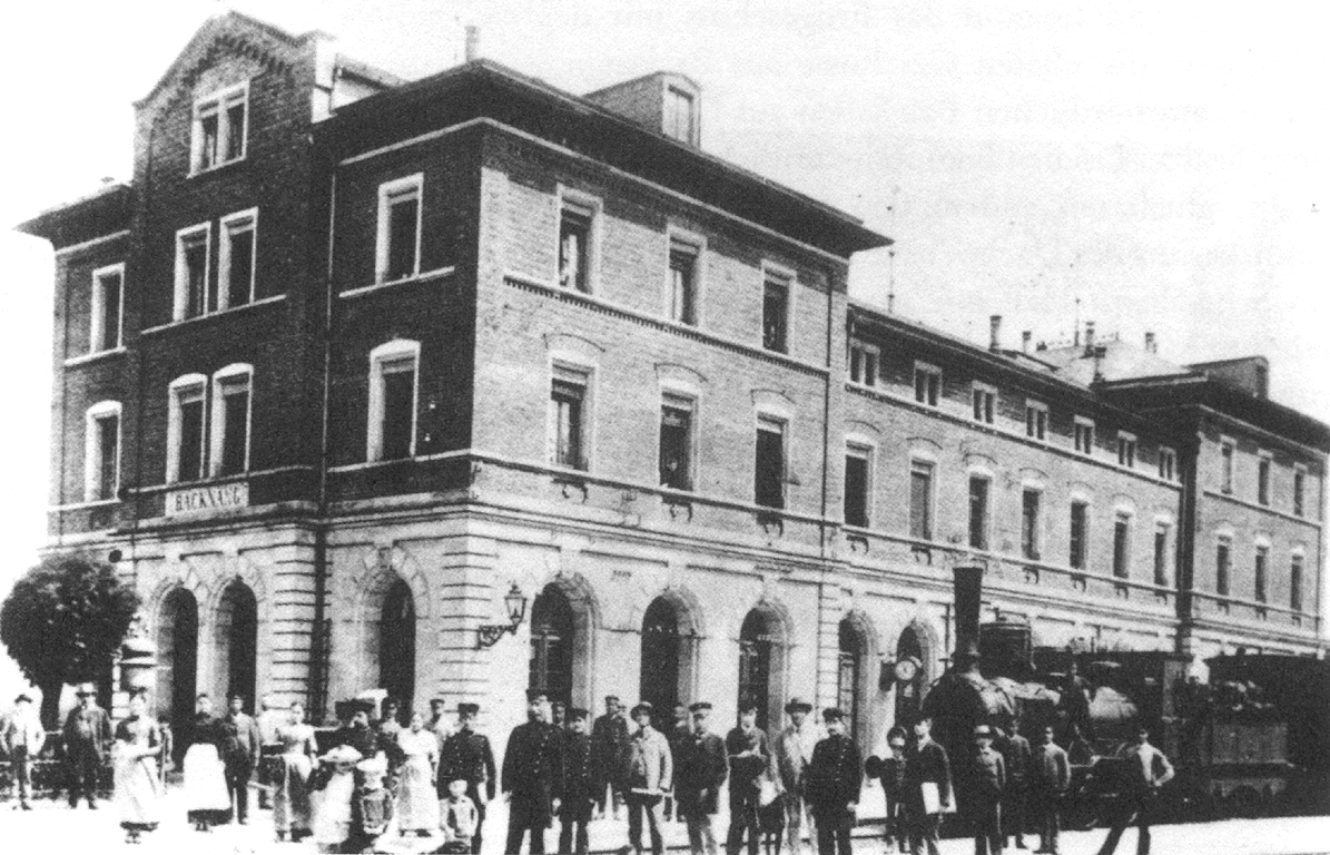 Bahnhof in Backnang mit seinem ersten Empfangsgebäude.